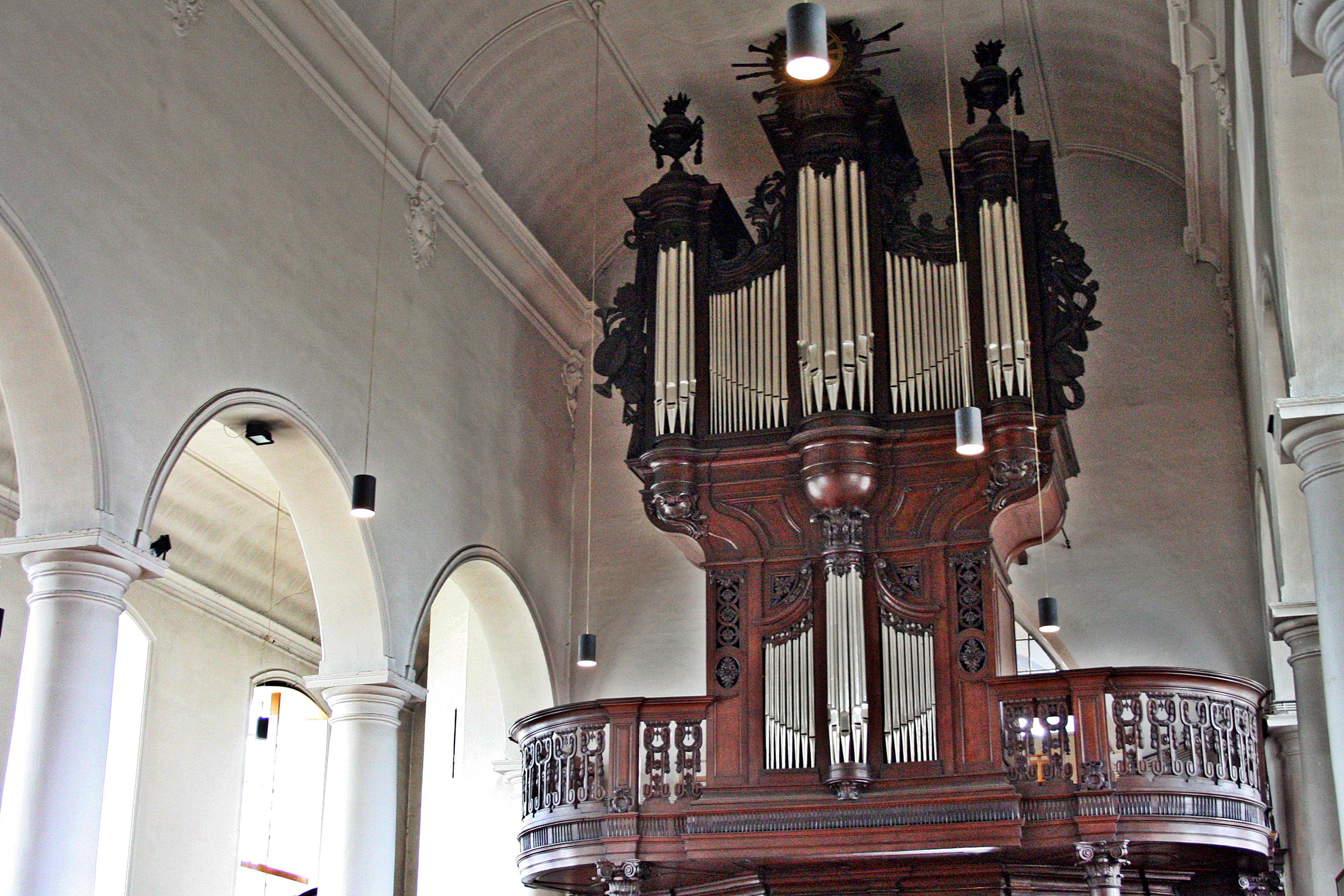 Doksaal met Robustelly-orgel in de Sint-Pieterskerk (Langdorp)